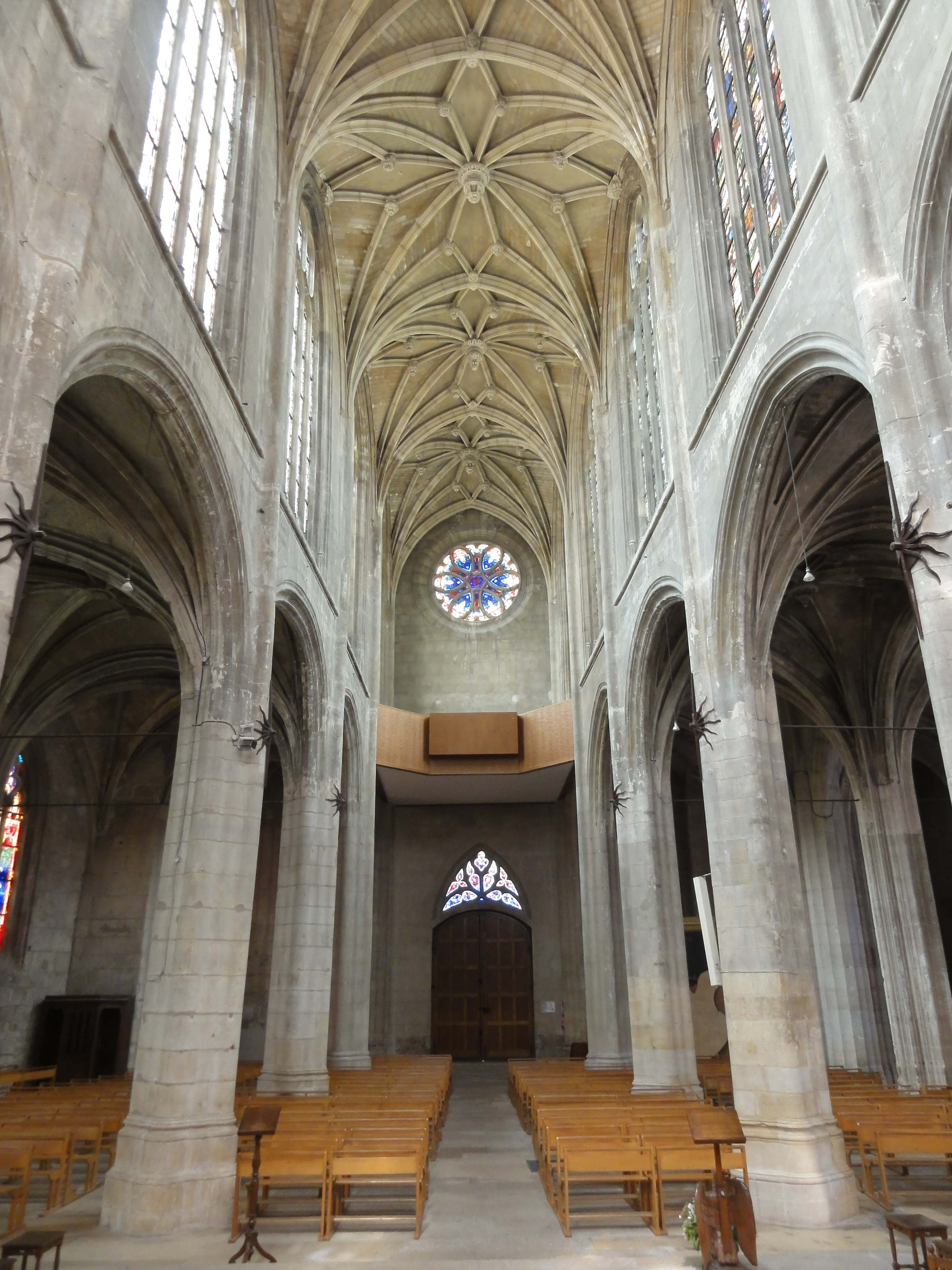 Voir titre.